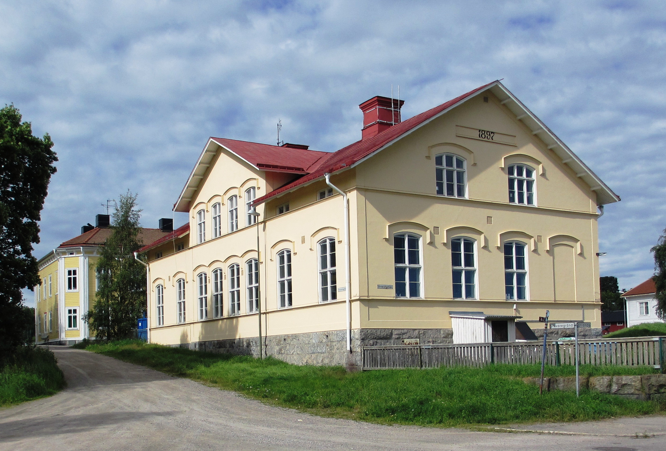 Gamla skolan i Stugsund